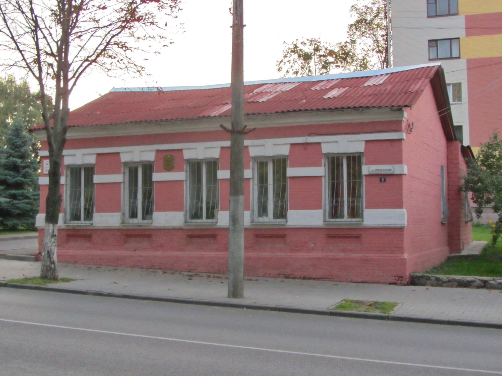 Беларуская (тарашкевіца): Забудова вул. Пралетарскай. г. Гомель This is a photo of Belarusian heritage monument. Reference number: 313Г000056 ( WLM)